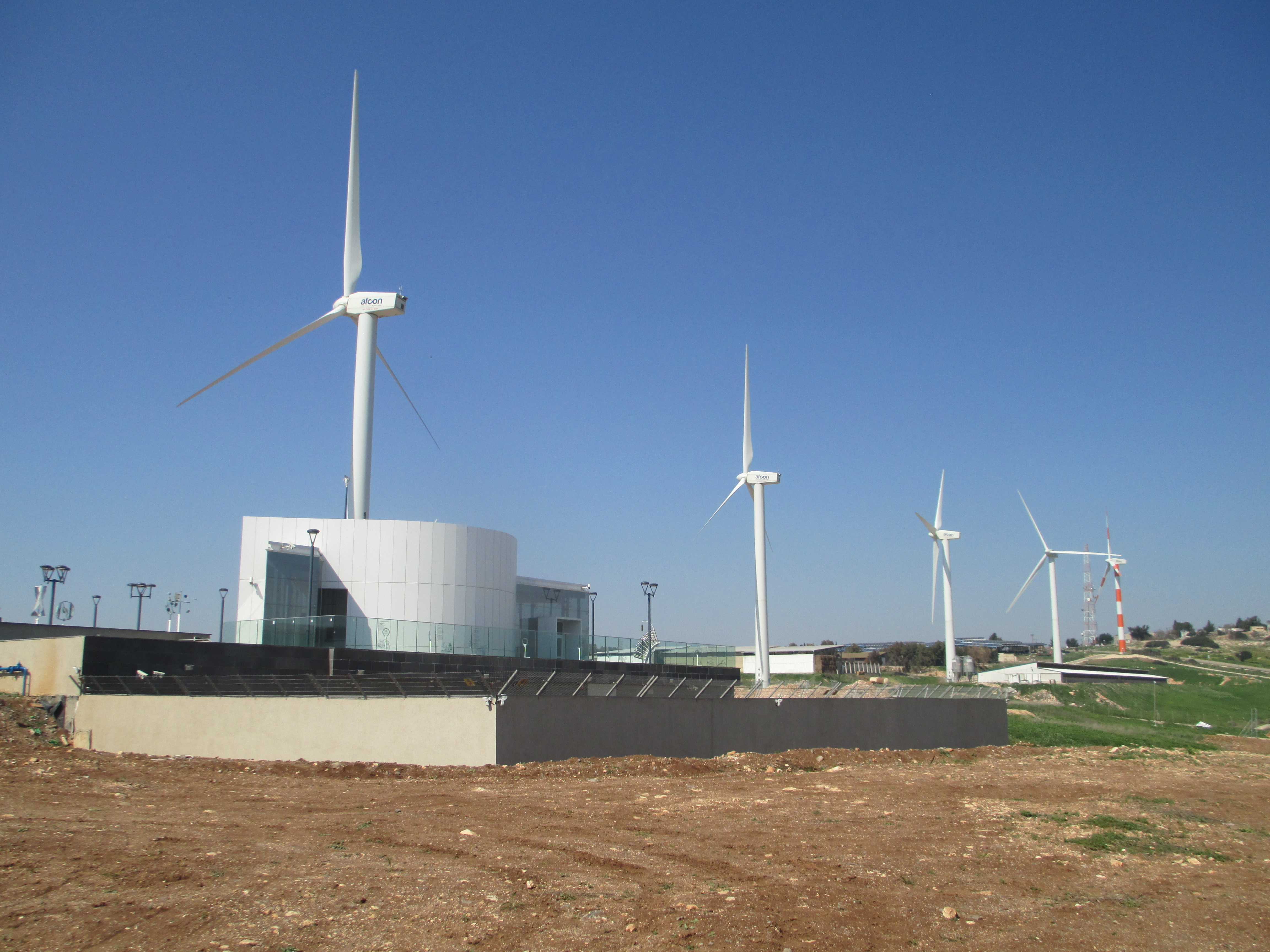 חוות הטורבינות במעלה גלבוע